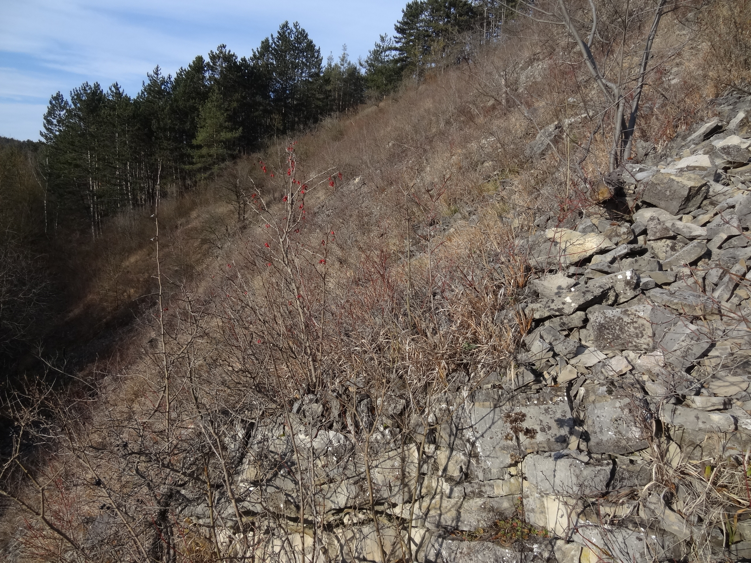 NPP Lochkovský profil - stráň nad ul. Na Cikánce, proti lomu Hvížďalka